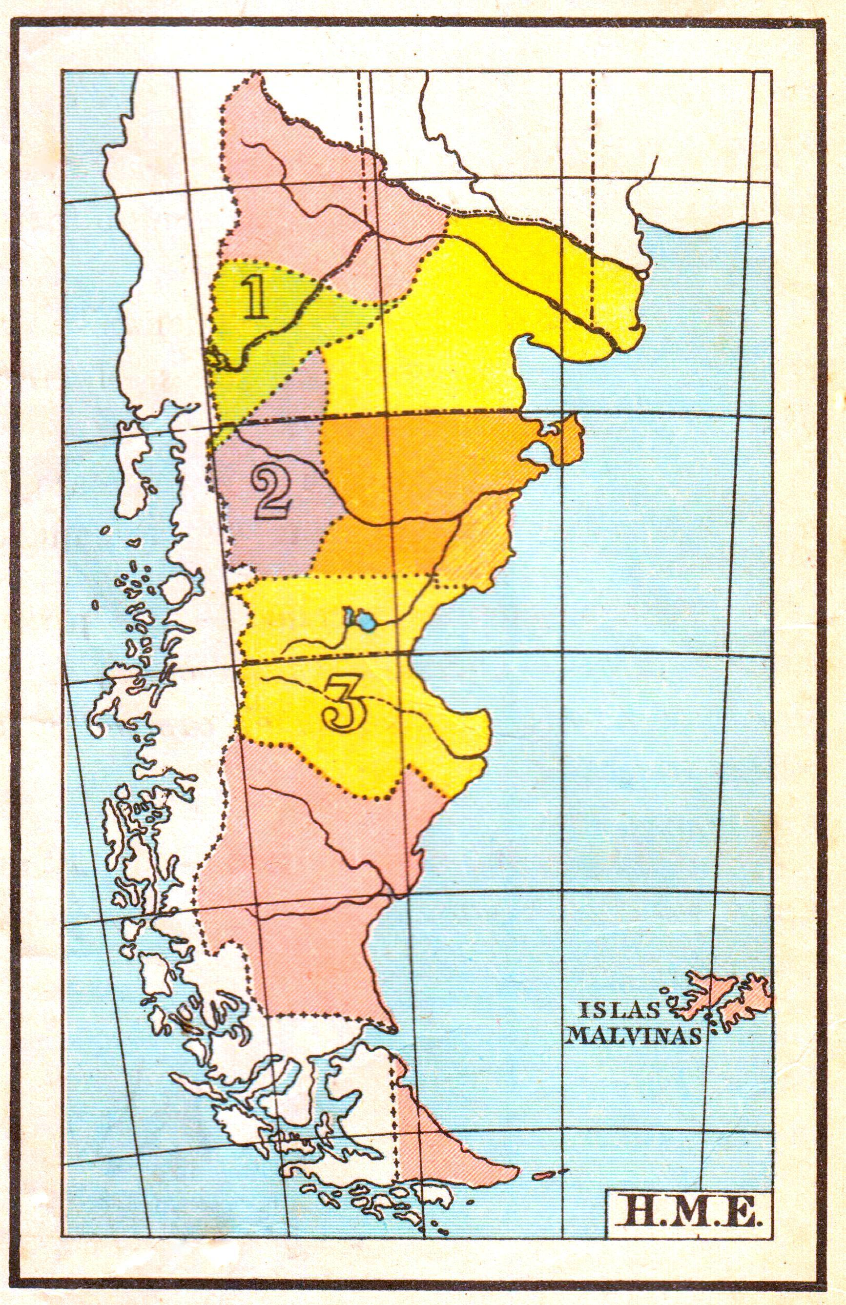 Antigua división administrativa de la Patagonia argentina. Las gobernaciones mencionadas son 1) Los Lagos, 2) San Martín, 3) Patagonia. Aparecen además las gobernaciones de Neuquén, Río Negro, Chubut y Santa Cruz. Tierra del Fuego se encuentra incorporado a Santa Cruz.